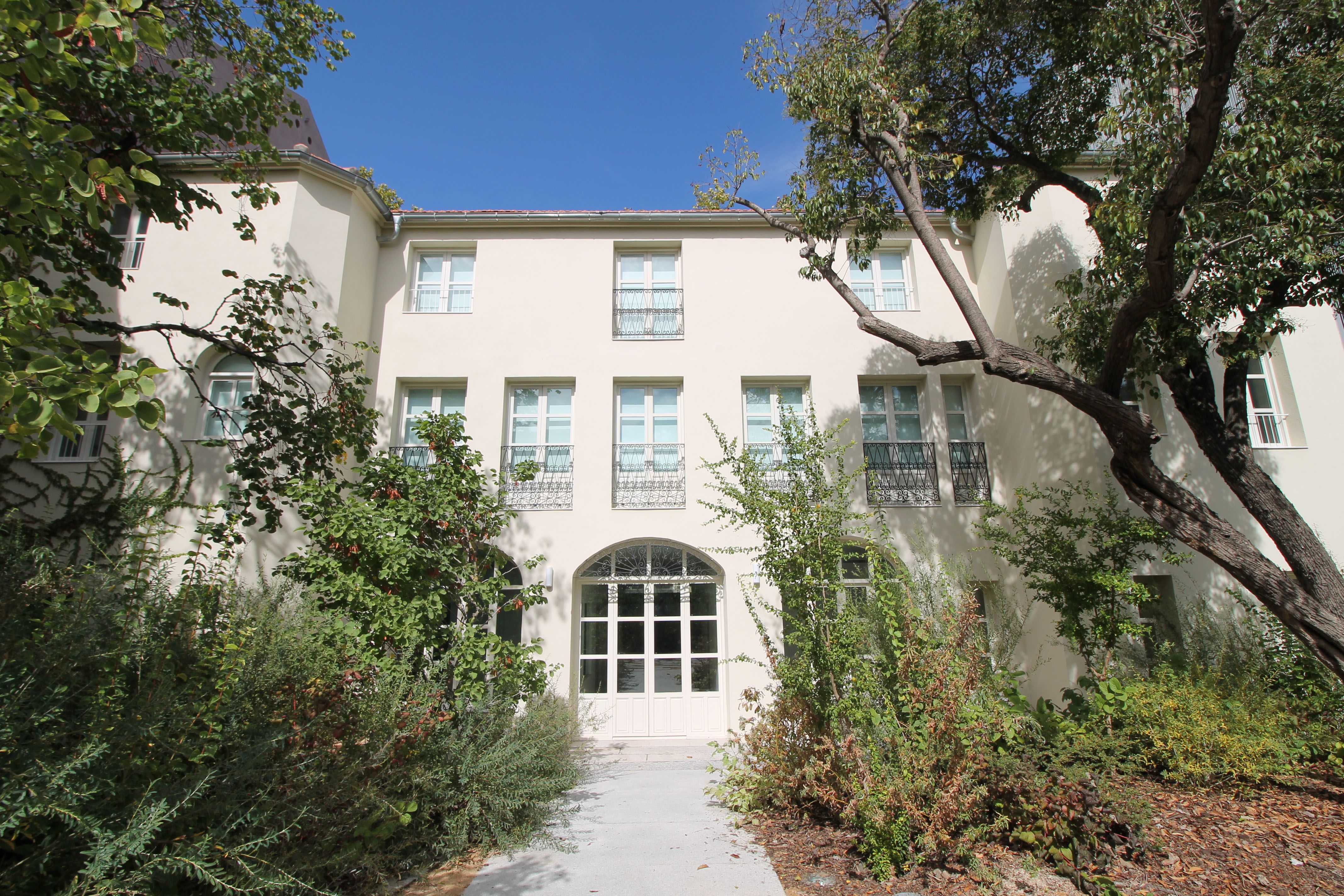 Fachada sur de la Casa de Giner y Cossío en la Institución Libre de Enseñanza (hoy Fundación Francisco Giner de los Ríos) de Madrid (España).